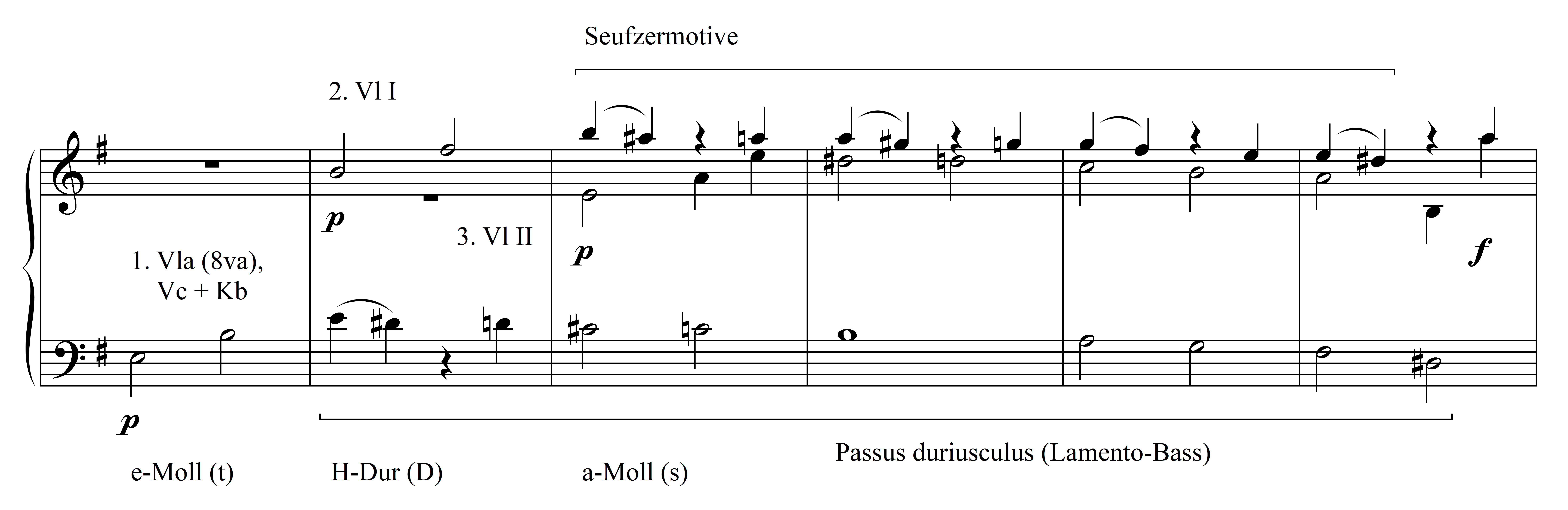 Notenbeispiel Haydn Sinfonie 44 - 1.Satz, Coda T. 141-146